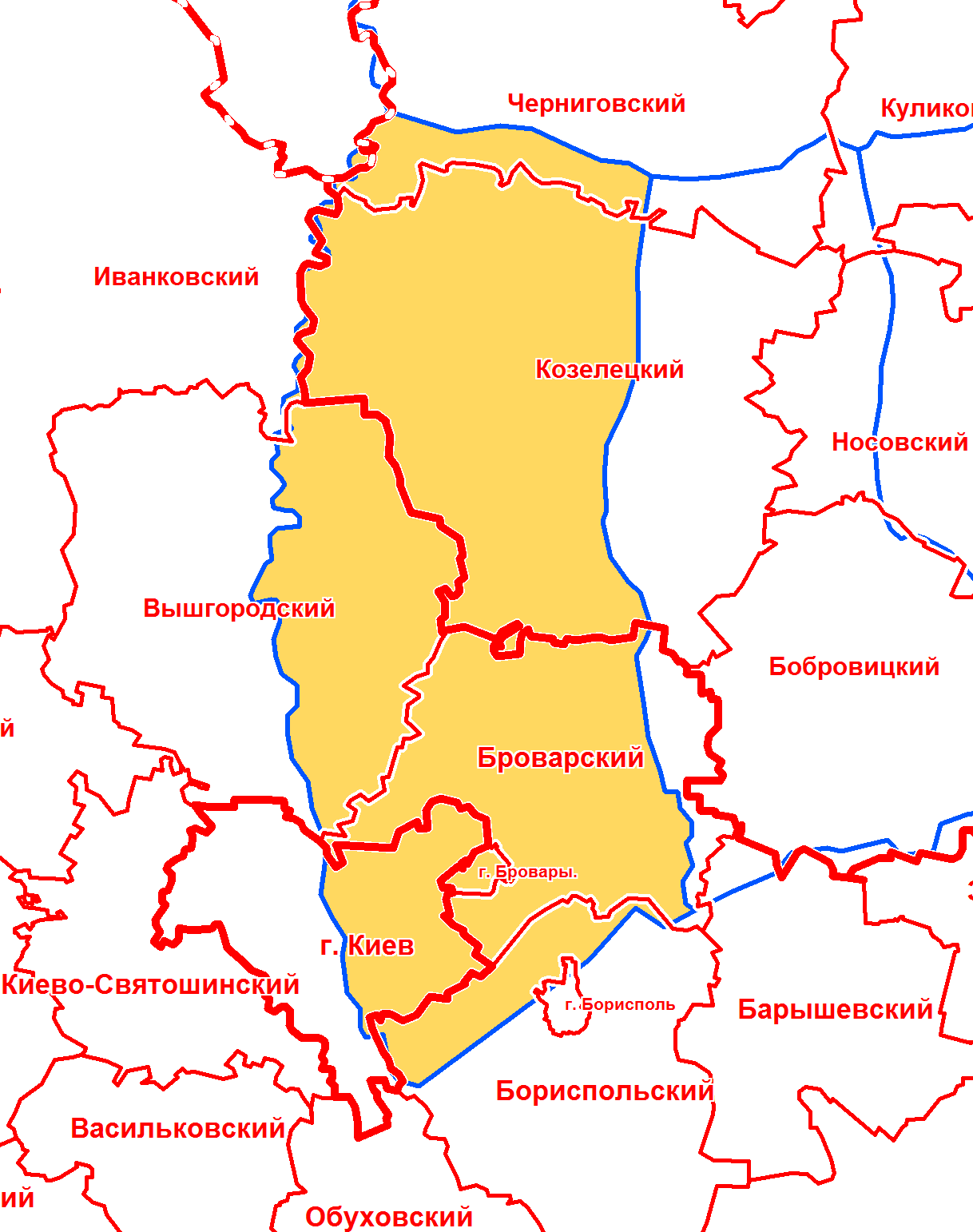 Остерский уезд Черниговской губернии в современной сетке районов